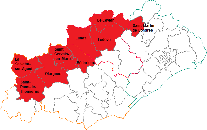 Limite approximative de la région des "Hauts cantons" dans le département de l'Hérault